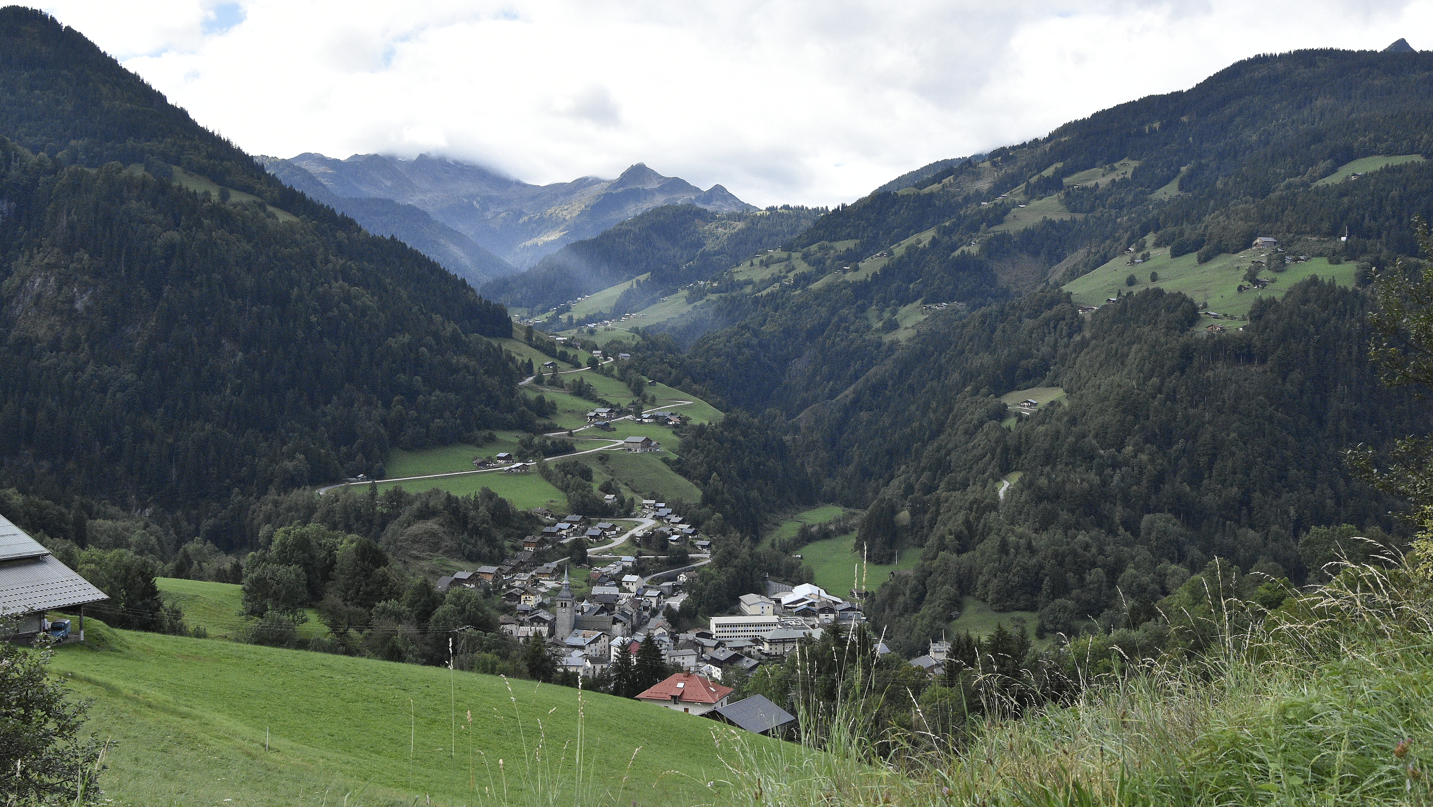 Beaufort (Savoie) - Frankrijk